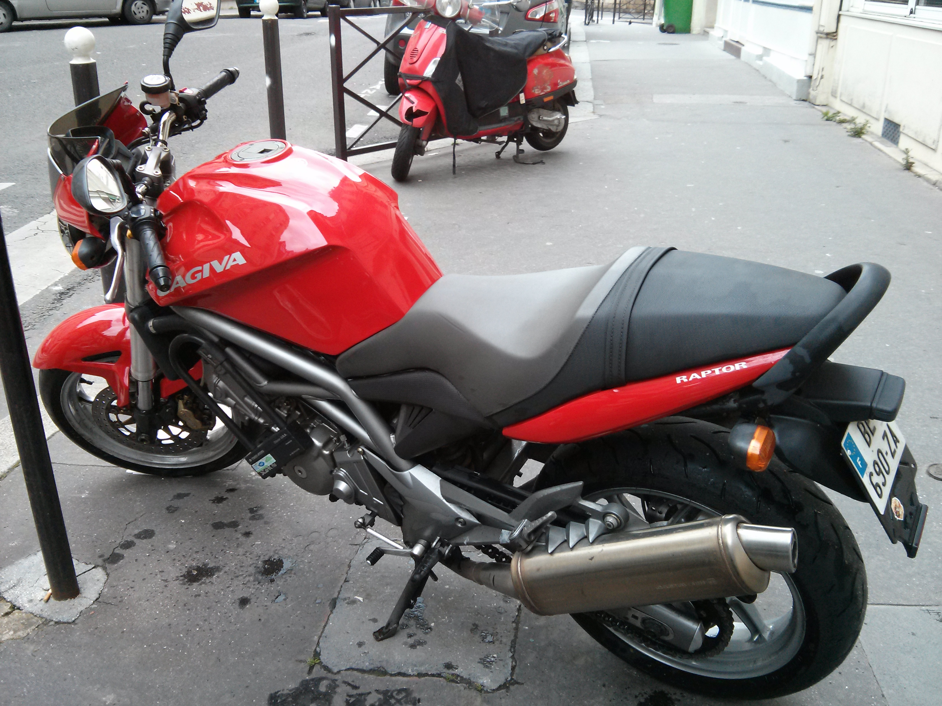 moto rouge cagiva raptor 650ie 2007. L'italienne avec un moteur de japonaise (bloc Suzuki )